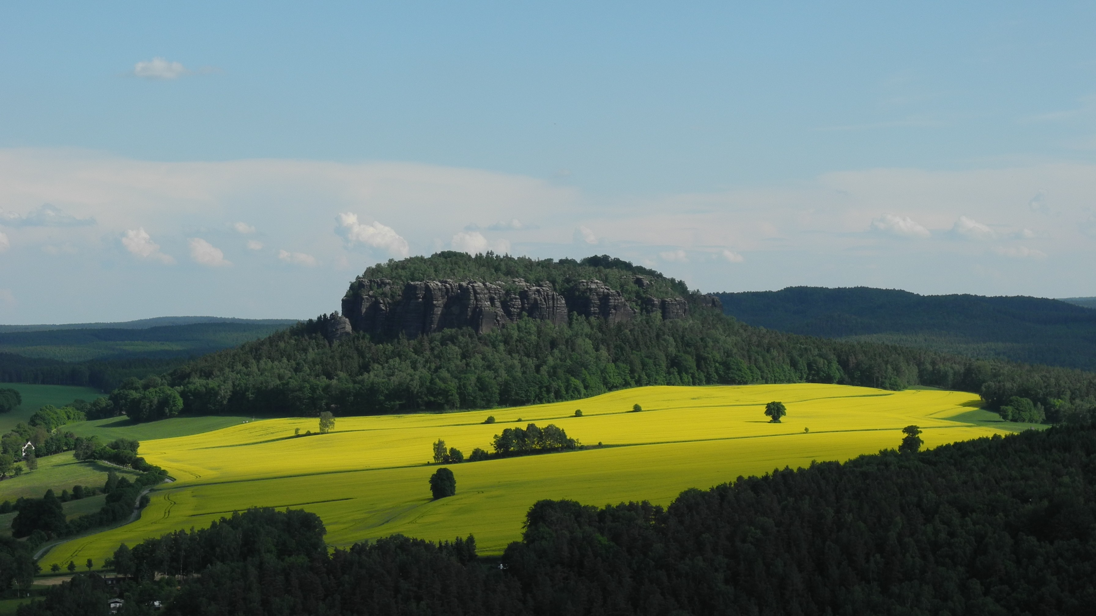 Königstein-Sächsische Schweiz -Sicht von der Festung auf denPfaffenstein